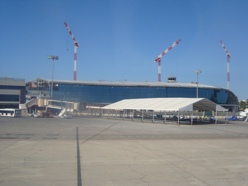 contruyendo